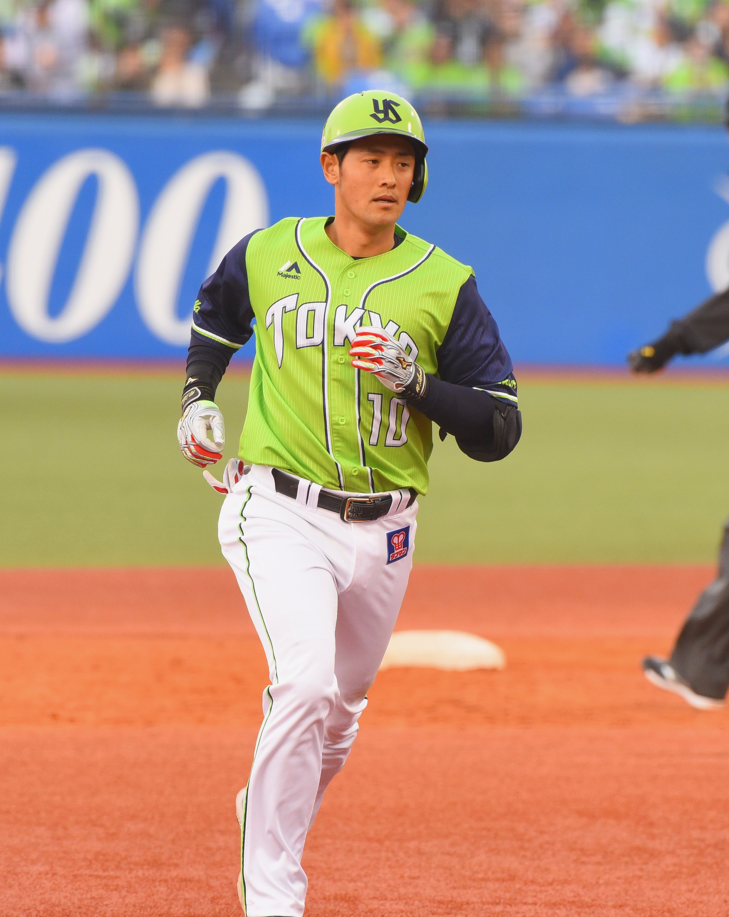 東京ヤクルトスワローズ 荒木貴裕 2018年4月7日 神宮球場